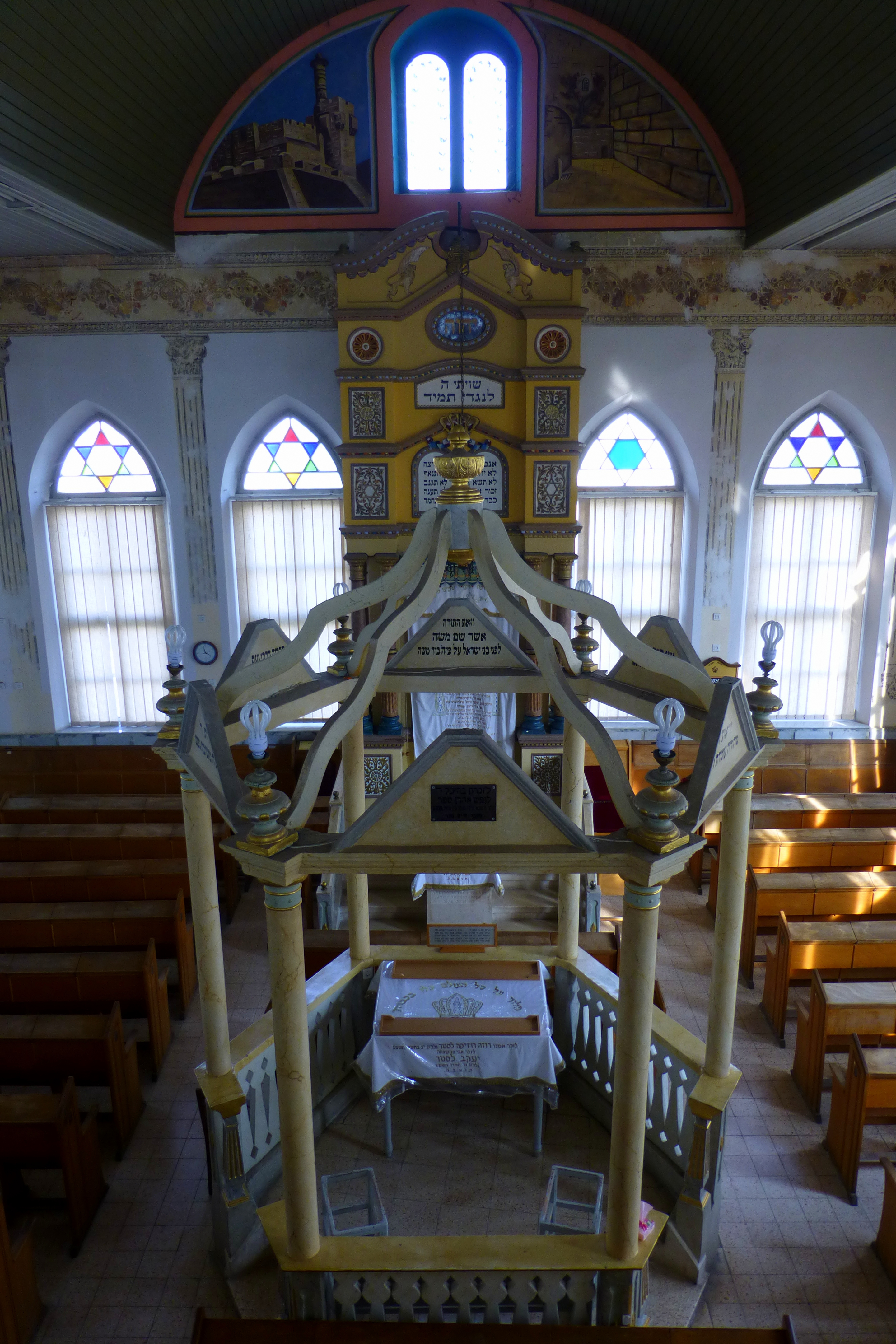 נוסד על ידי ראובן לרר ושימש בעבר כבית ספר, בית כנסת, בית ההגנה והיה המרכז הקהילתי הראשון למושבה נס ציונה. כיום משמש כמוזיאון בית ראשונים.